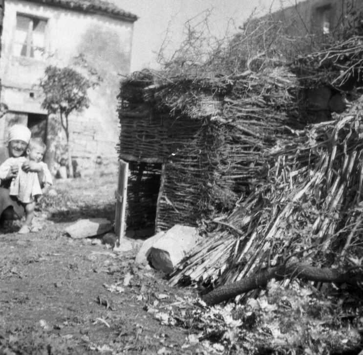 "Kažeta" za kokoši, Dvori.